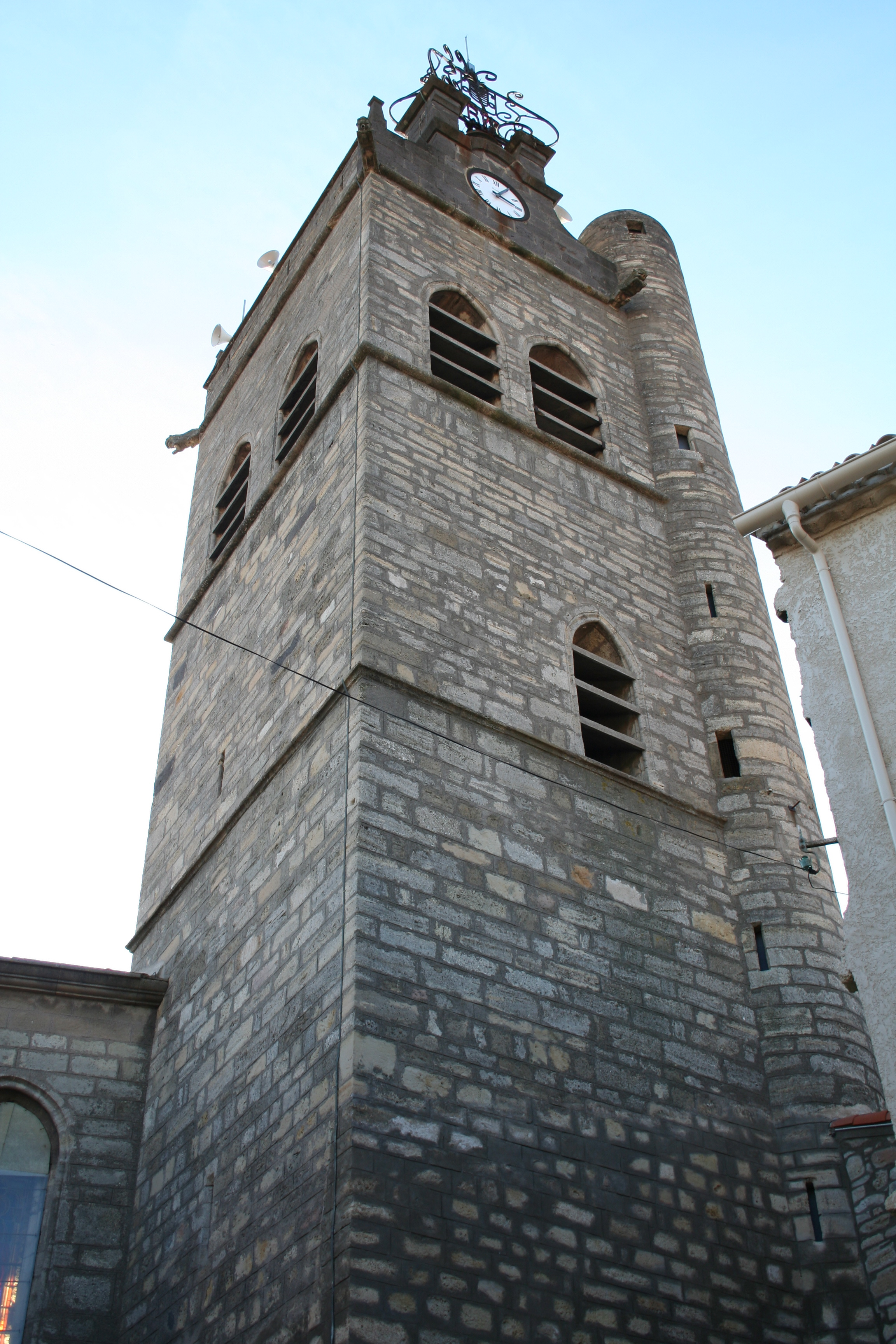 Florensac (Hérault) - Église paroissiale Saint-Jean-Baptiste (clocher).